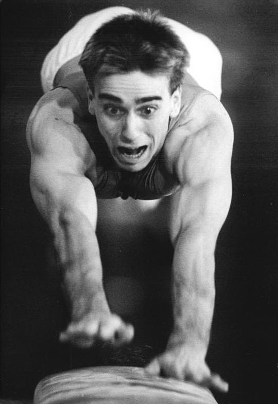 Sylvio Kroll ADN-ZB Oberst 1.4.89 Bez. Potsdam: DTV-Pokal im Turnen der Männer in Falkensee-Großer Favorit für den Sieg bei den diesjährigen Pokalwettkämpfen ist Sylvio Kroll vom SC Cottbus, Olympiazweiter im Pferdsprung. -siehe auch ADN-Meldung